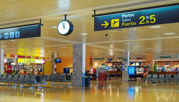 terminal